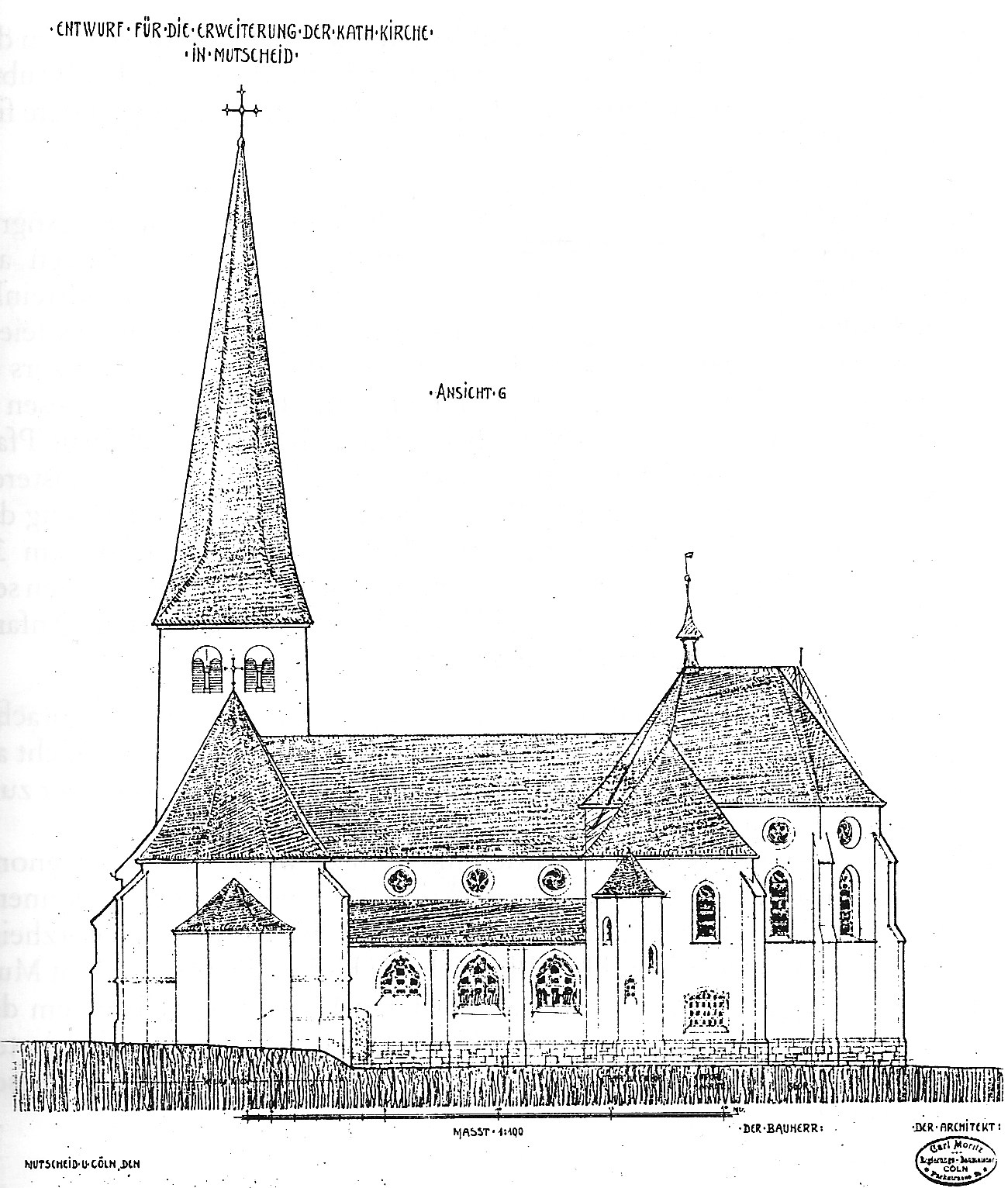 Dies ist der Entwurf der neuen Kirche in Mutscheid von Carl Moritz aus dem Jahr 1910. Der Entwurf ist sehr ähnlich umgesetzt worden.